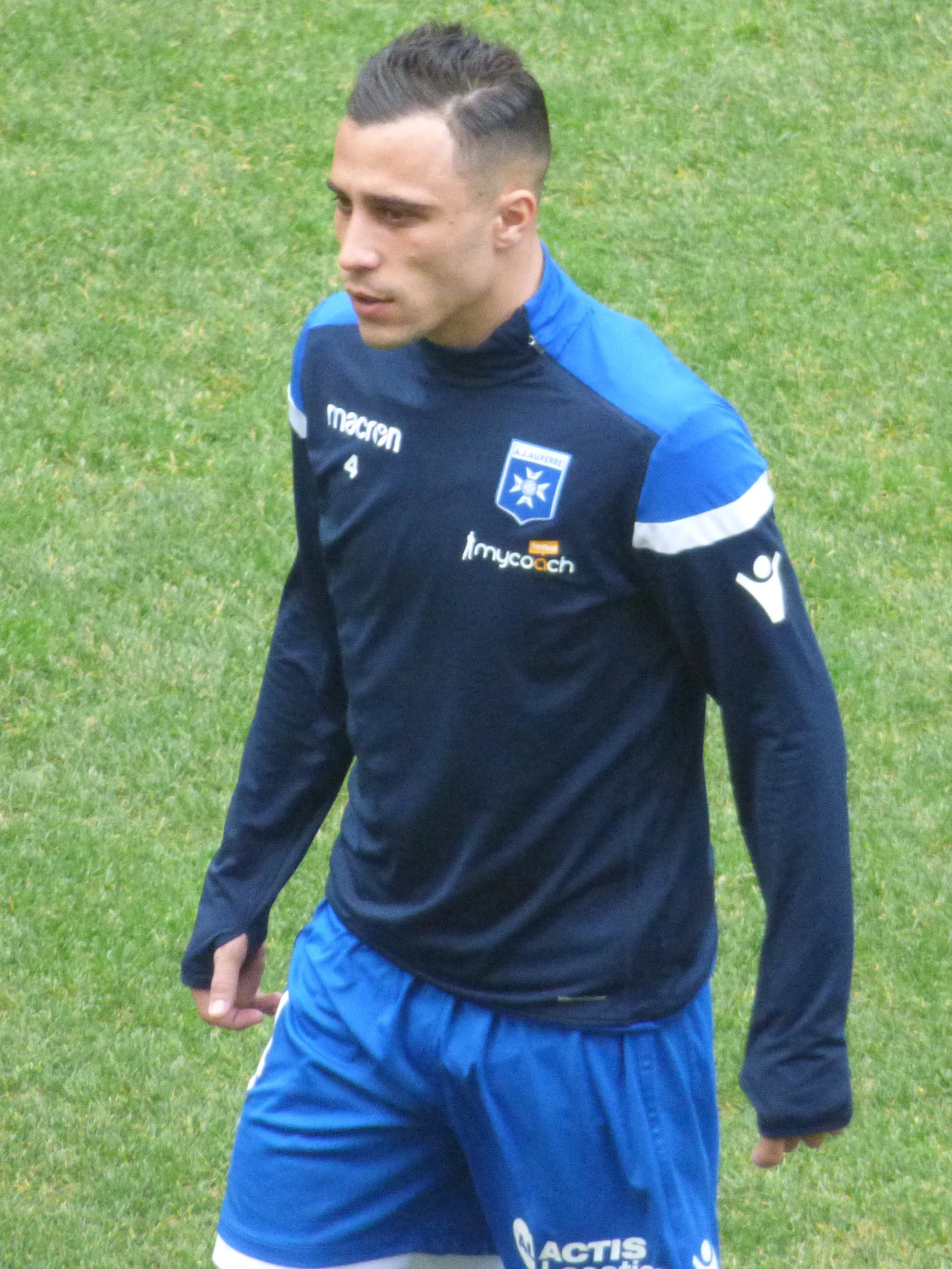 Michaël Barreto avant le match RC Lens - AJ Auxerre, comptant pour la 28ème journée du championnat de France de football de Ligue 2 2018-2019, le 9 mars 2019 au Stade Bollaert-Delelis.